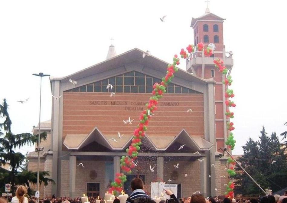 La foto è scatta da me